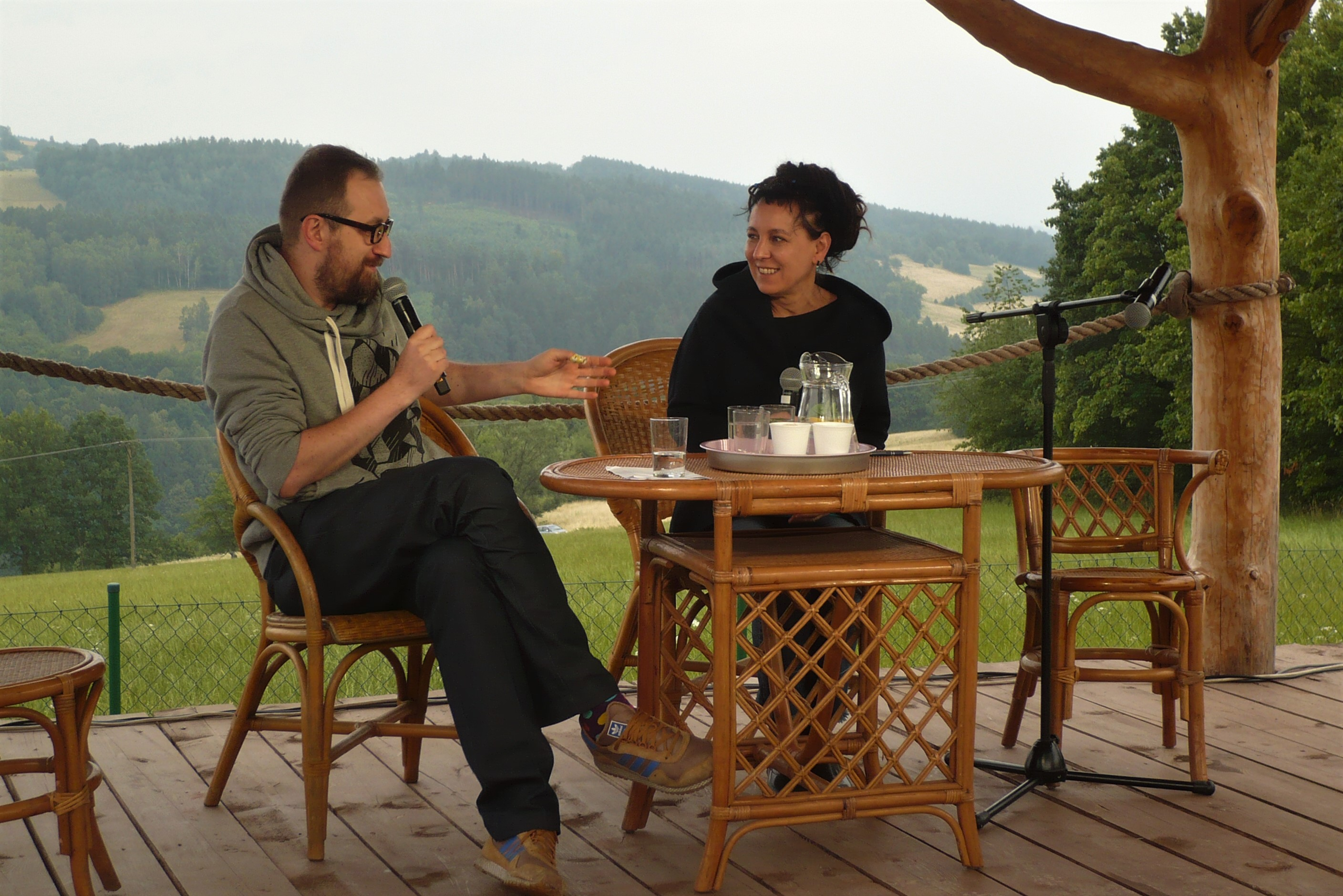 Michał Nogaś i Olga Tokarczuk podczas Festiwalu Góry Literatury, 2018.